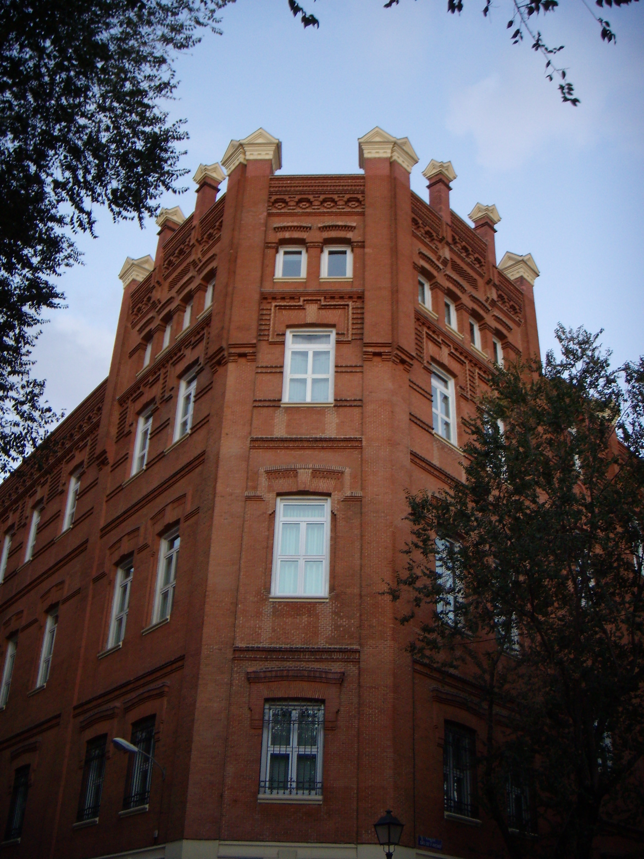 Currently Universidad Pontificia Comillas, Madrid (previously the Colegio de Areneros) by Enrique Fort y Antonio Palacios (1903-10). Arte Neomudéjar. Ref: Desarrollo y Estilos Arquitectónicos por Joaquín Bosque Maurel . Boletín de la Real Sociedad Geográfica, 2001-2002.